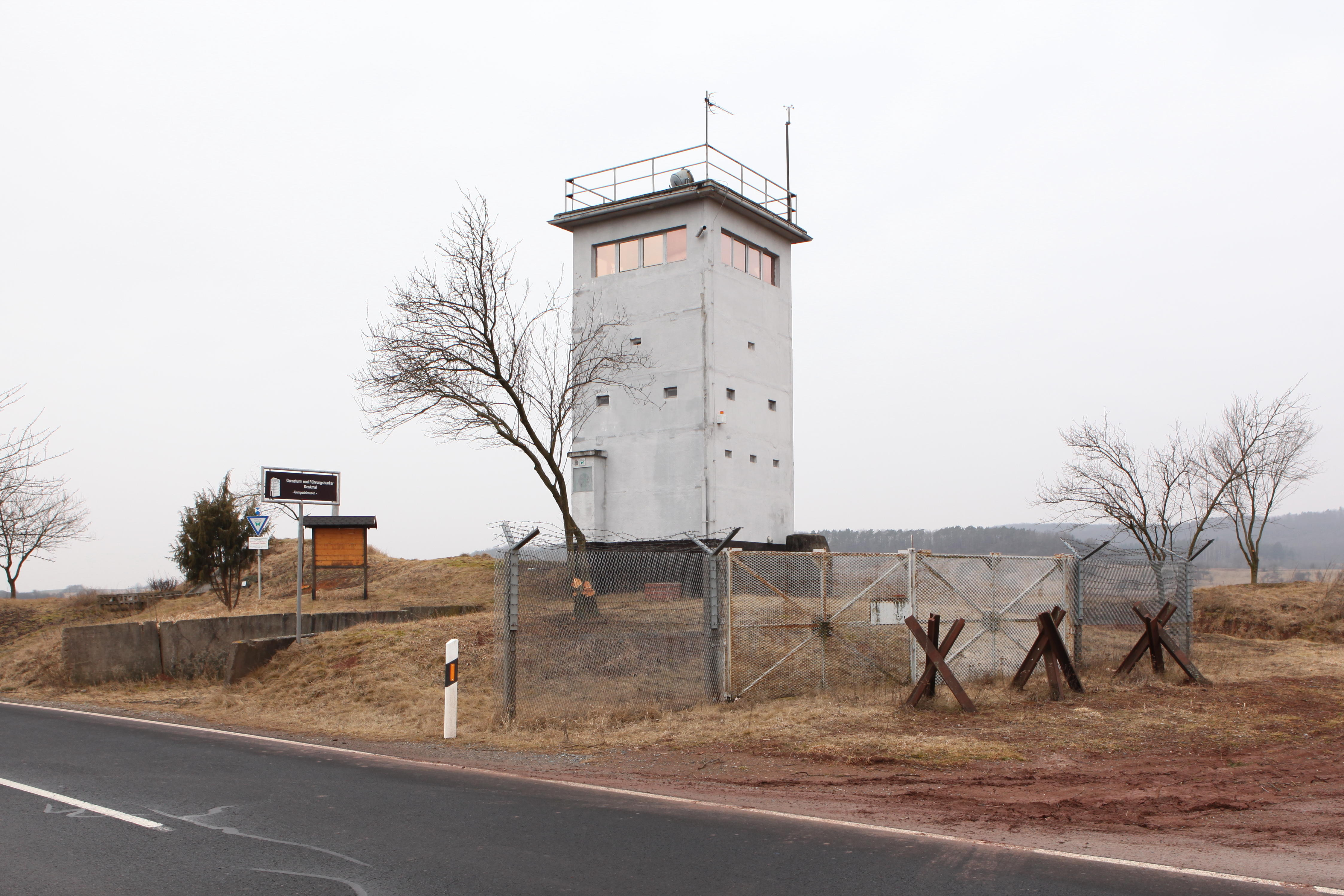 Grenzdenkmal bei Gompertshausen, Landkreis Hildburghausen